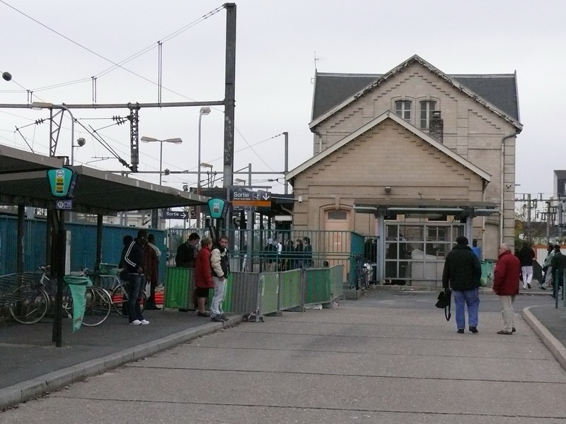 La gare d'Epinay-Villetaneuse, gare routière et abris vélo